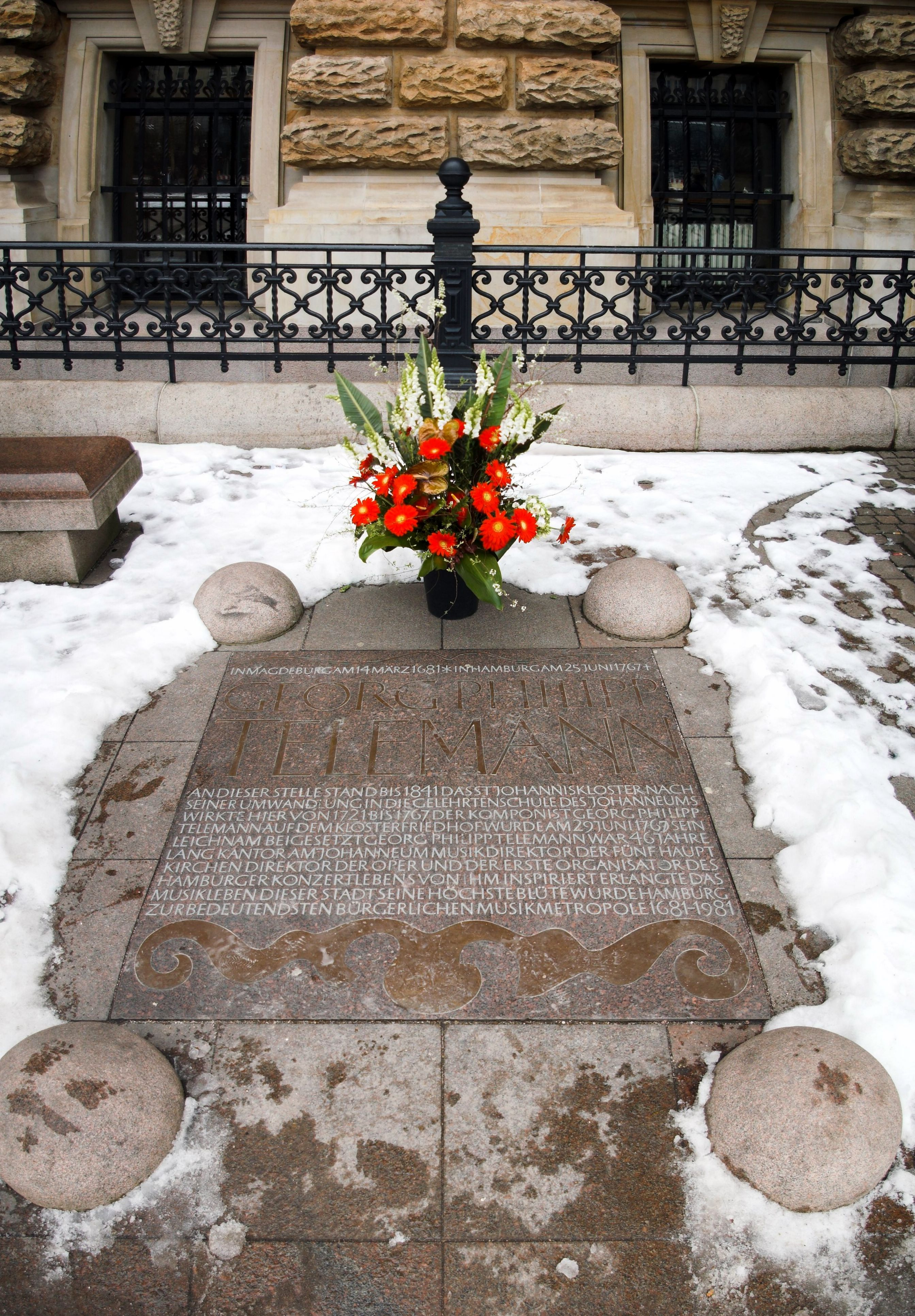 Gedenktafel zu Georg Philipp Telemann am Hamburger Rathaus